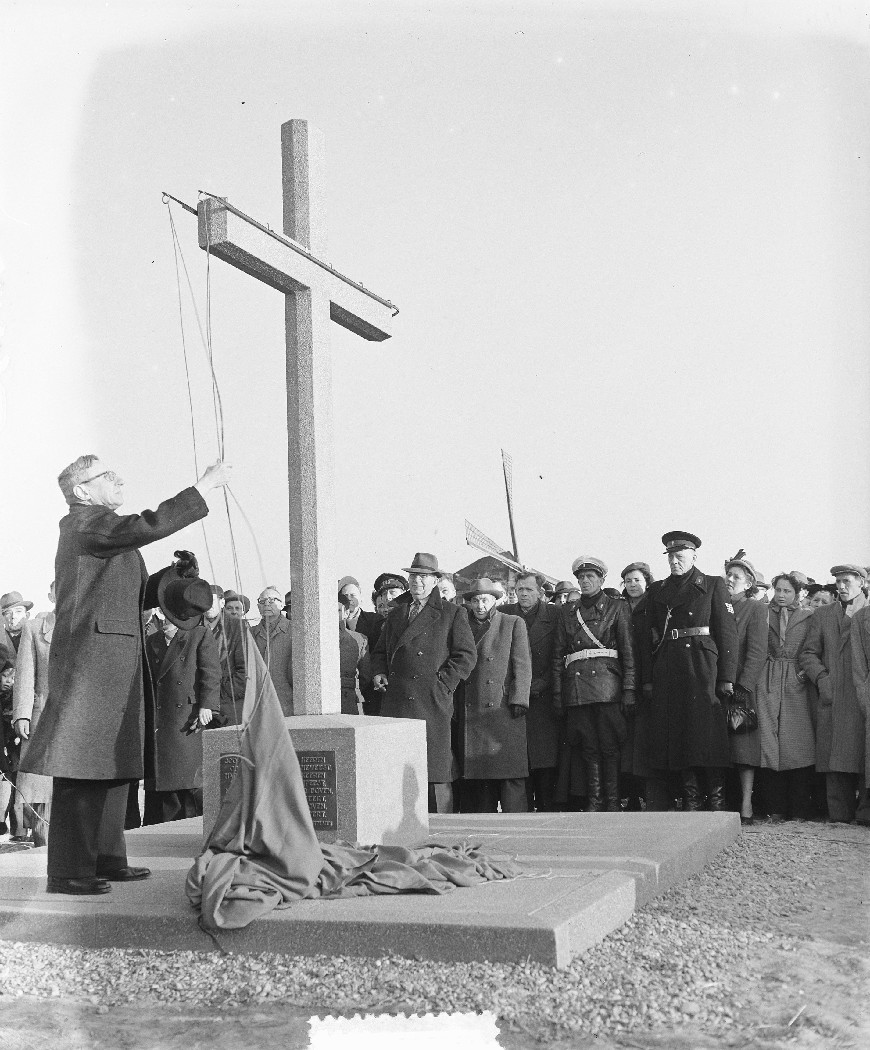 Onthulling monument voor de 50 slachtoffers van de Watersnoodramp van 1953 door prof. dr. J. de Quay